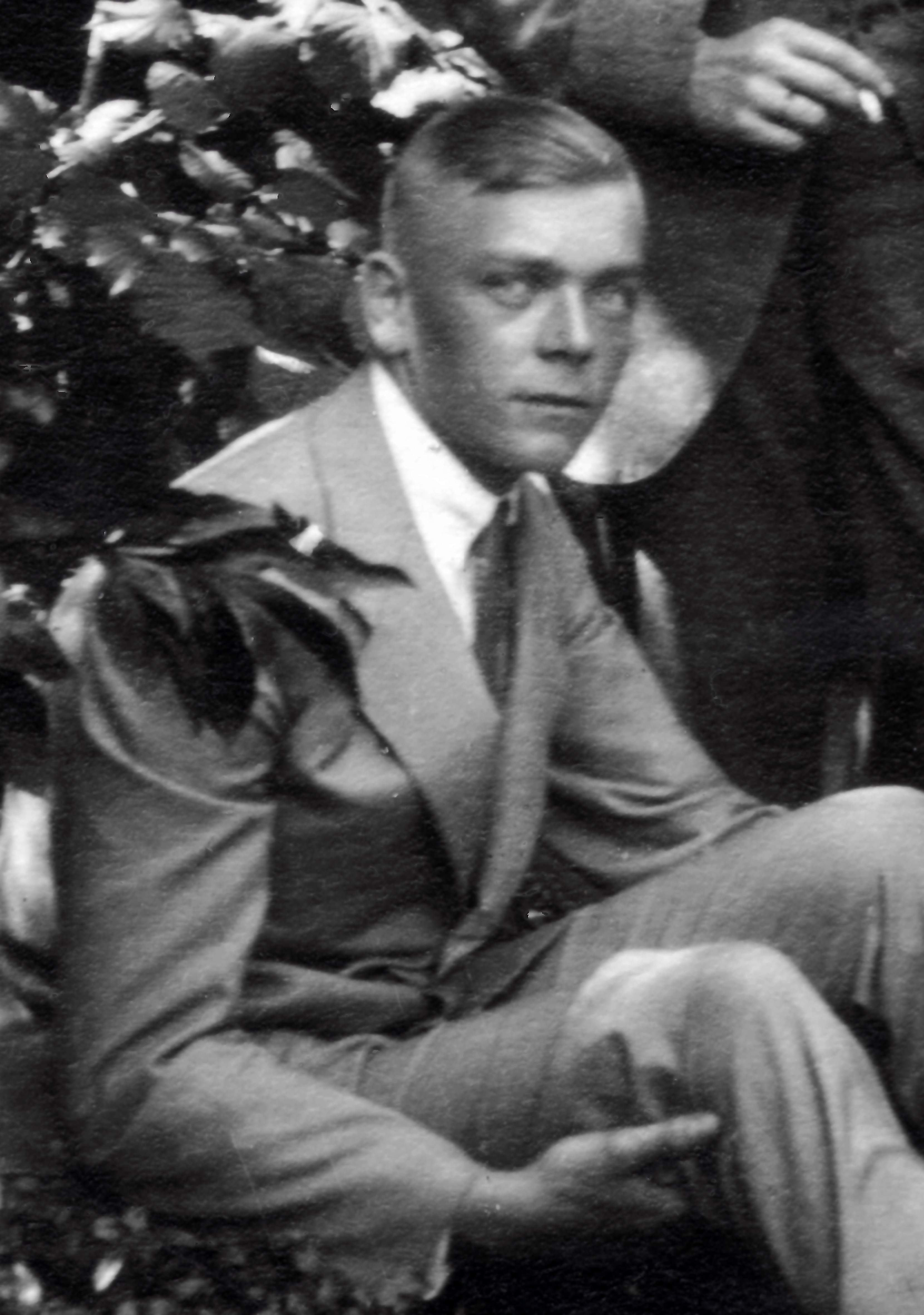 Fotografie von Hans Karl Müller